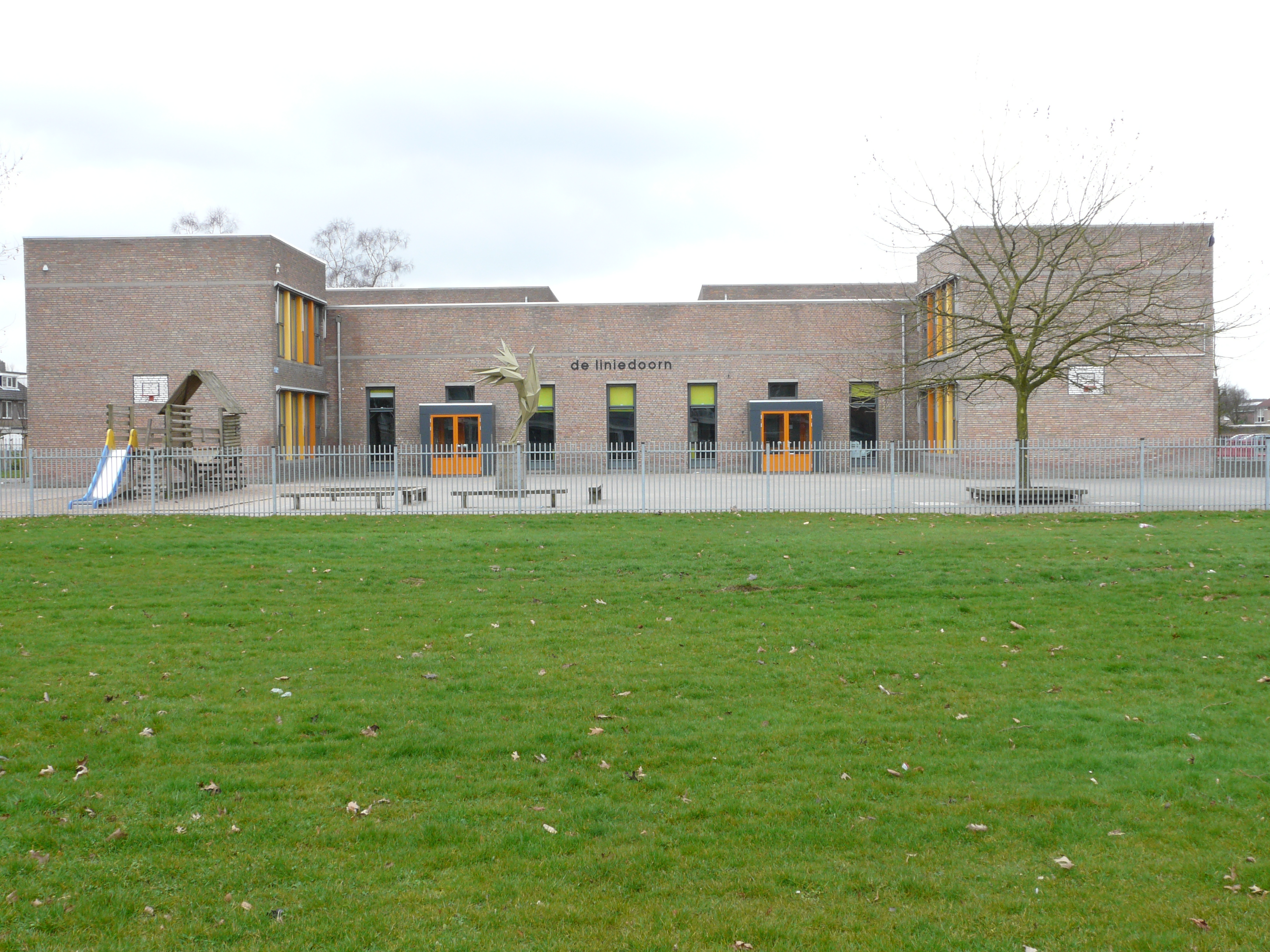 Zicht op een deel van de speelplaats, aan de achterzijde, van de Katholieke basisschool De Liniedoorn gevestigd aan de Baliëndijk 78 in Breda. Gelegen in de wijk de Doornbos-Linie in het noorden van Breda